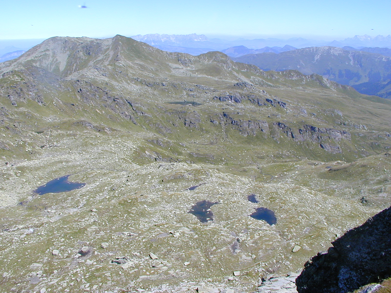 Österreich, Kitzbühler Alpen, Blick vom Östlichen Salzachgeier (2466m) nach NordNordOst. Der markante Berg im Hintergrund ist der Schwebenkopf (2354m). Aus dem sichelförmigen See links entspringt die Salzach, auch Salzachursprung genannt.